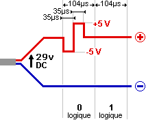 Niveau des tensions du bus EIB/KNX